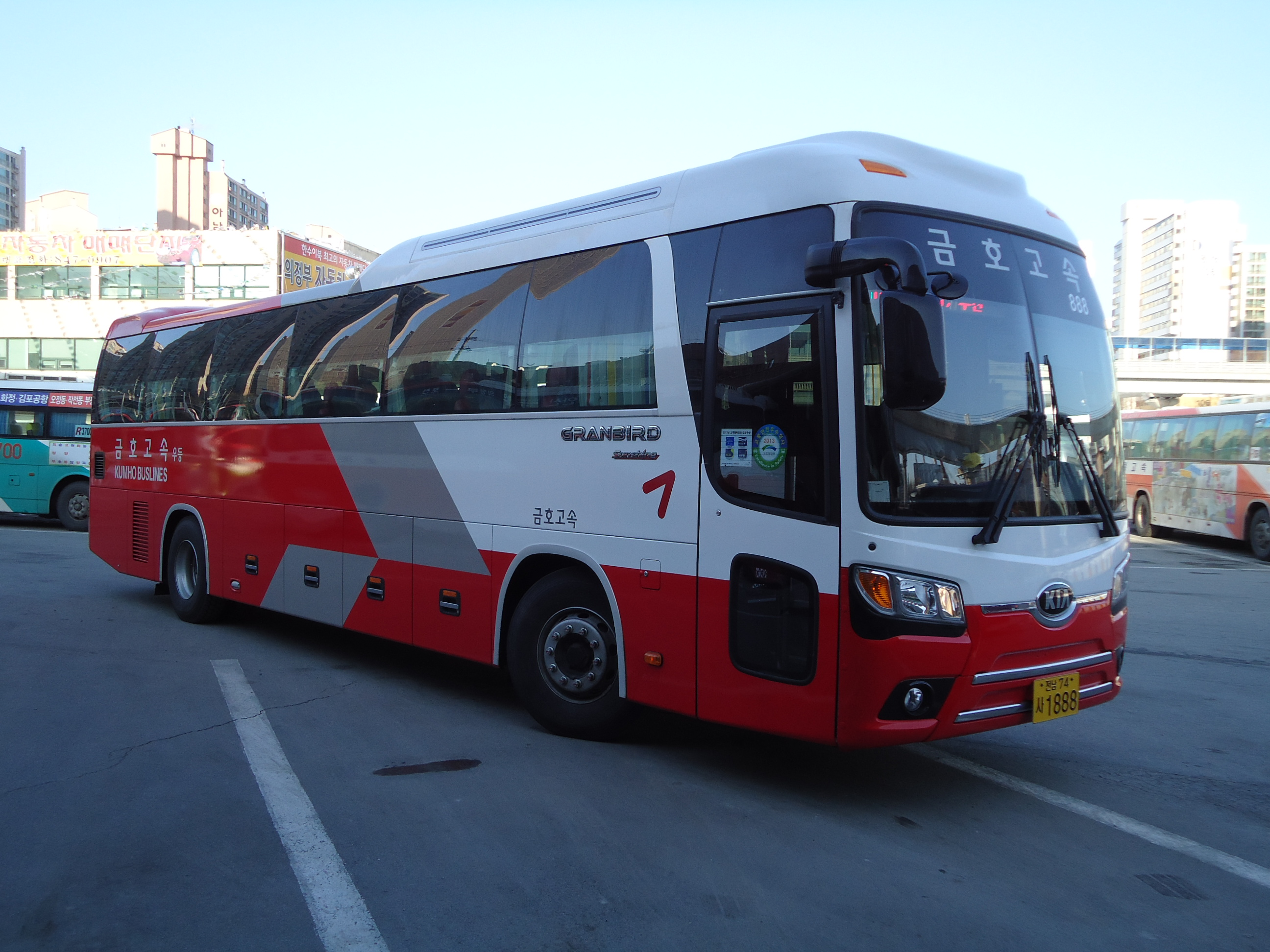 금호고속 뉴 그랜버드 이노베이션 선샤인 2013년식 의정부↔구리, 부산